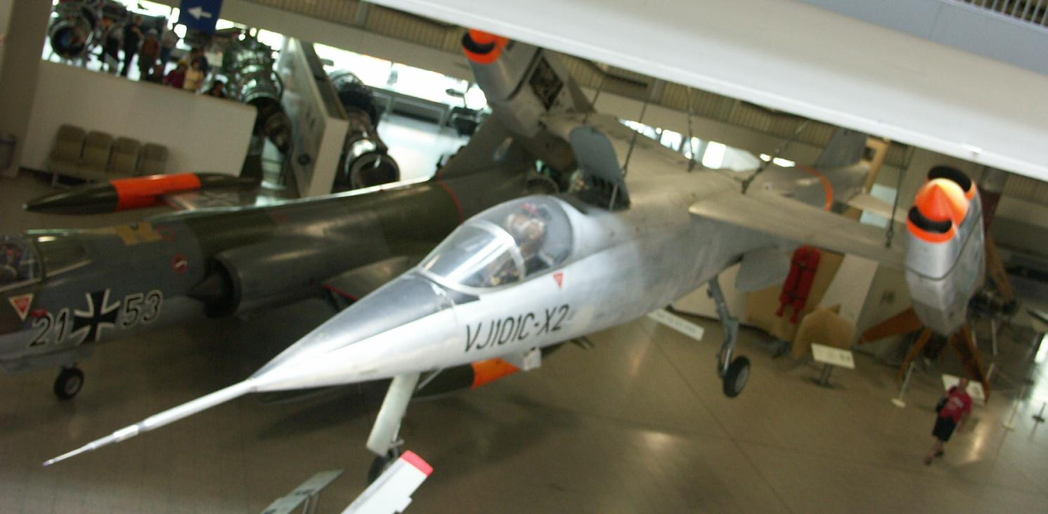 Deutsches Museum Munich Photo by Jean-Patrick Donzey